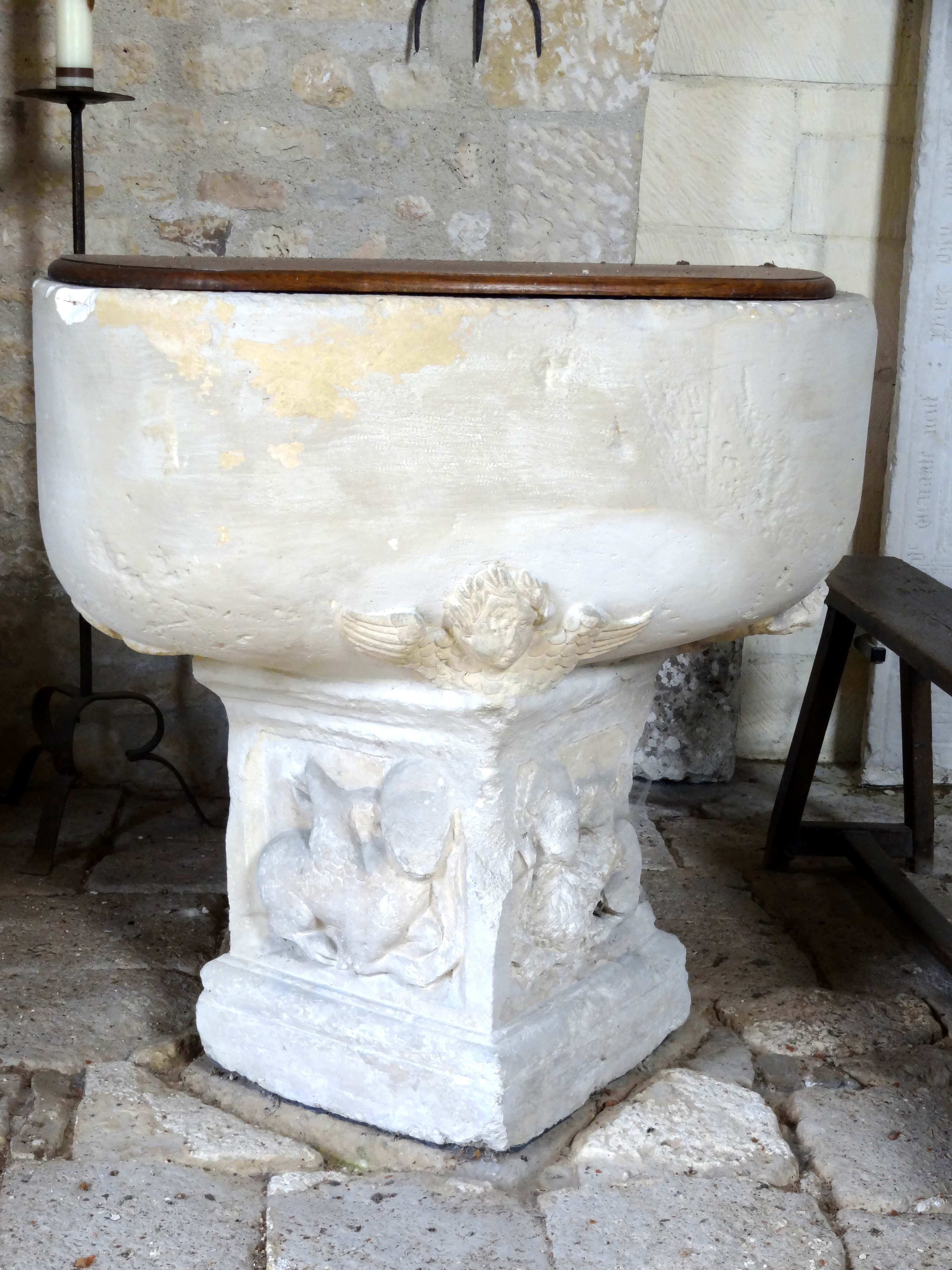 Mobilier de l'église - voir titre.